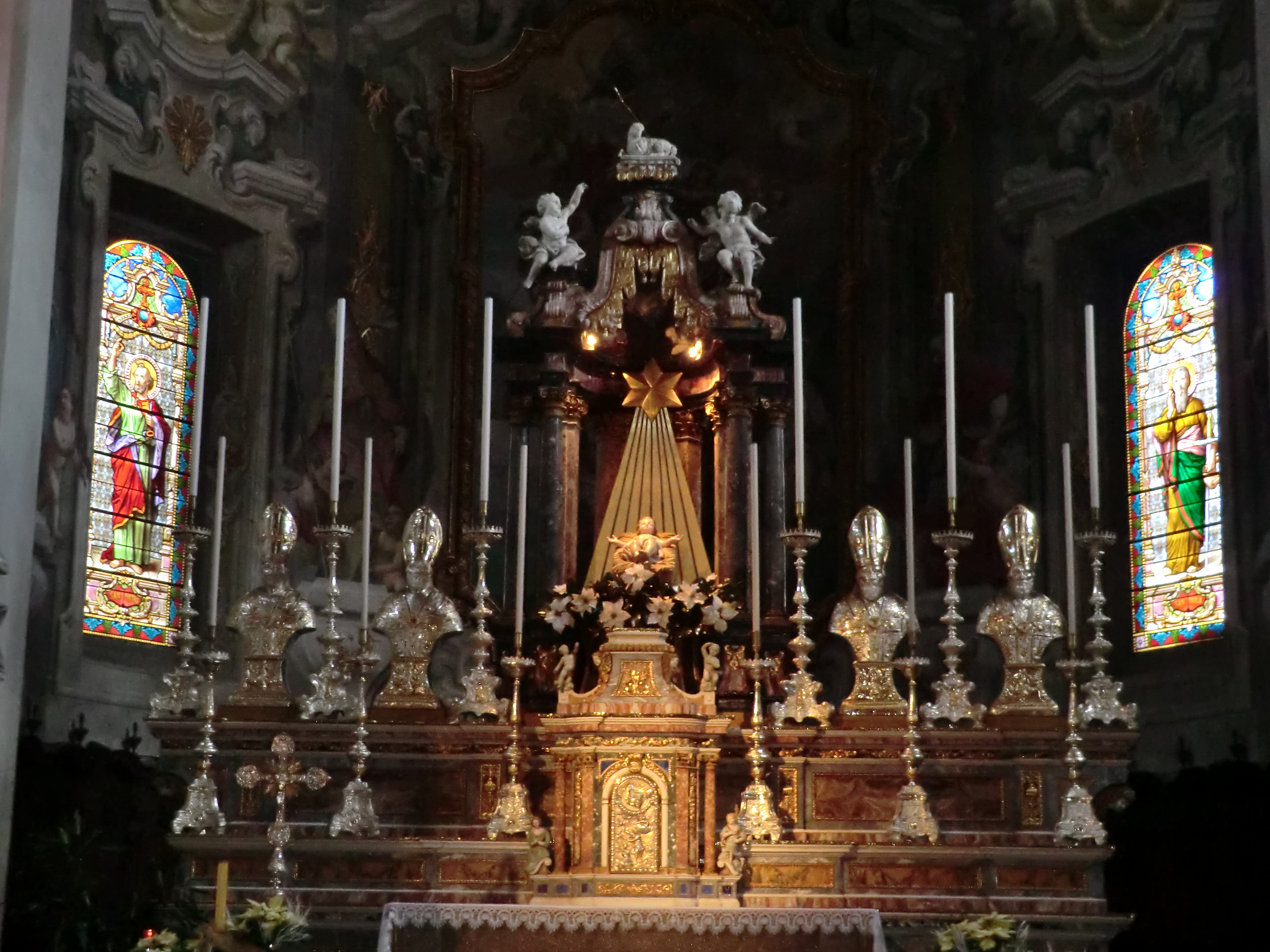 L'altare maggiore di San Giovanni a Natale